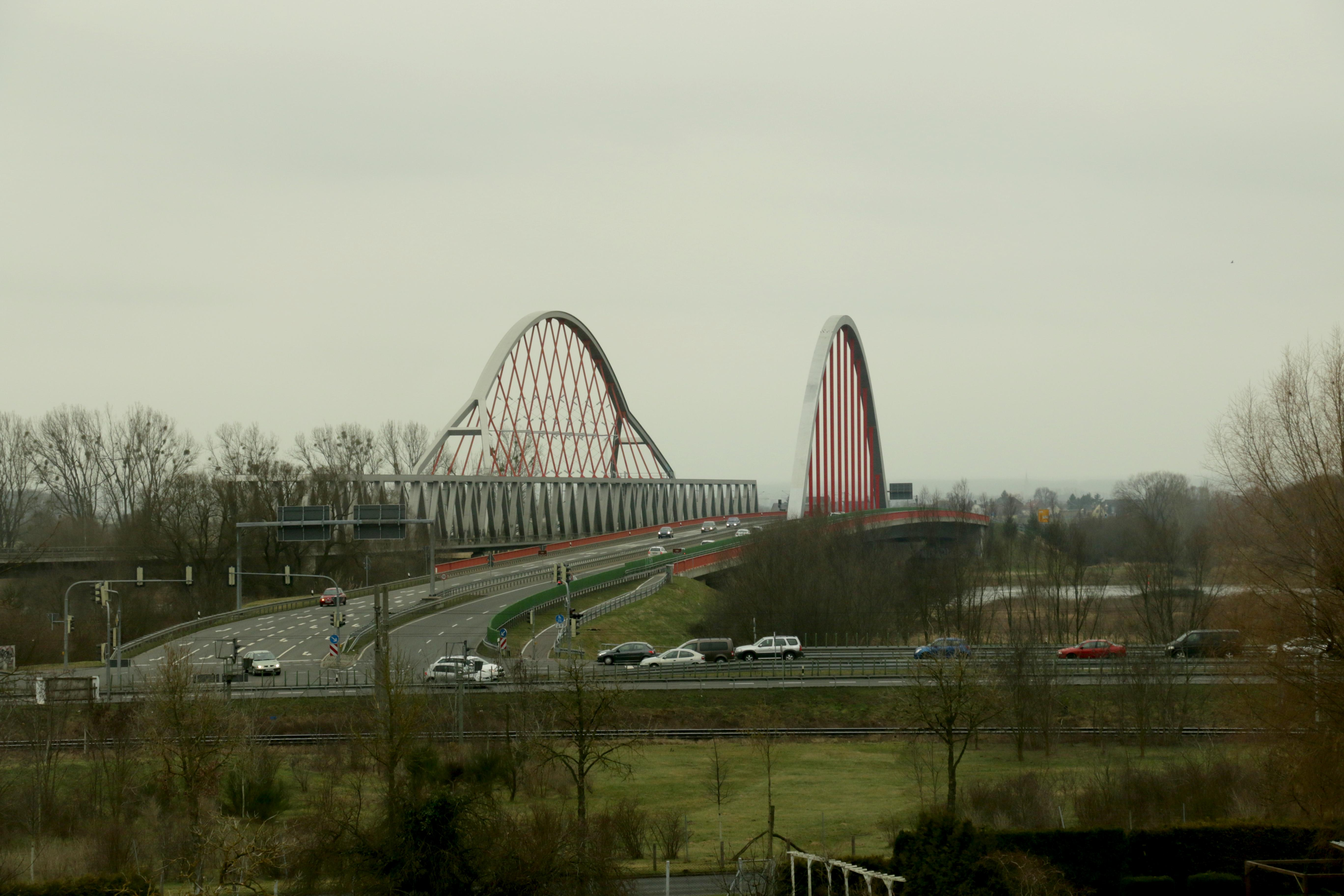 Elbrücke bei Lutherstadt Wittenberg.